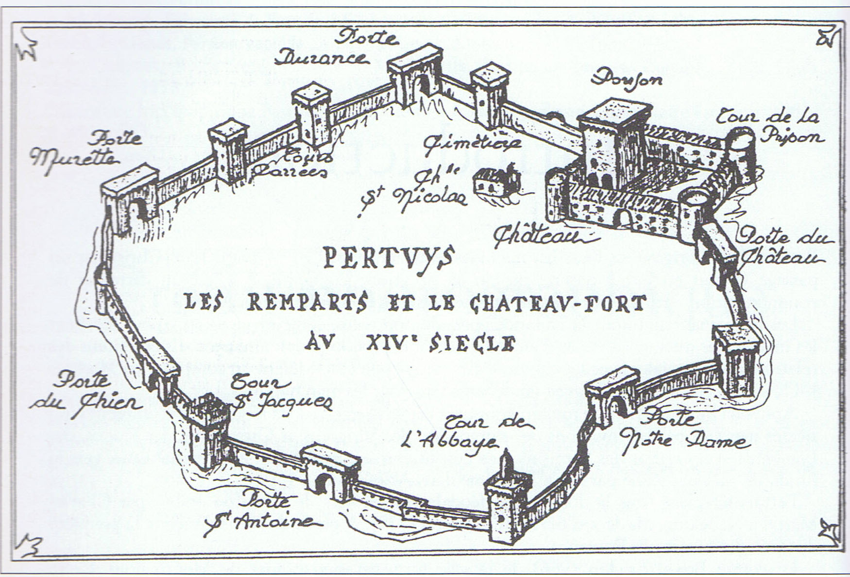 reproduction d'après le croquis de Mr Metois